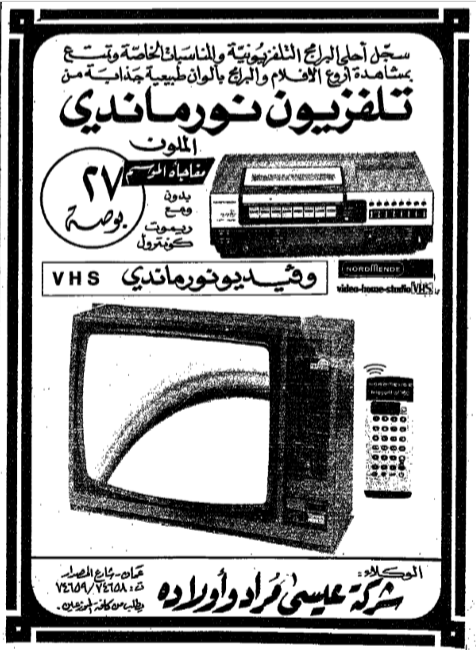 أعلان تلفزيون النورمندي لشركة عيسى مراد والد حيدر مراد.